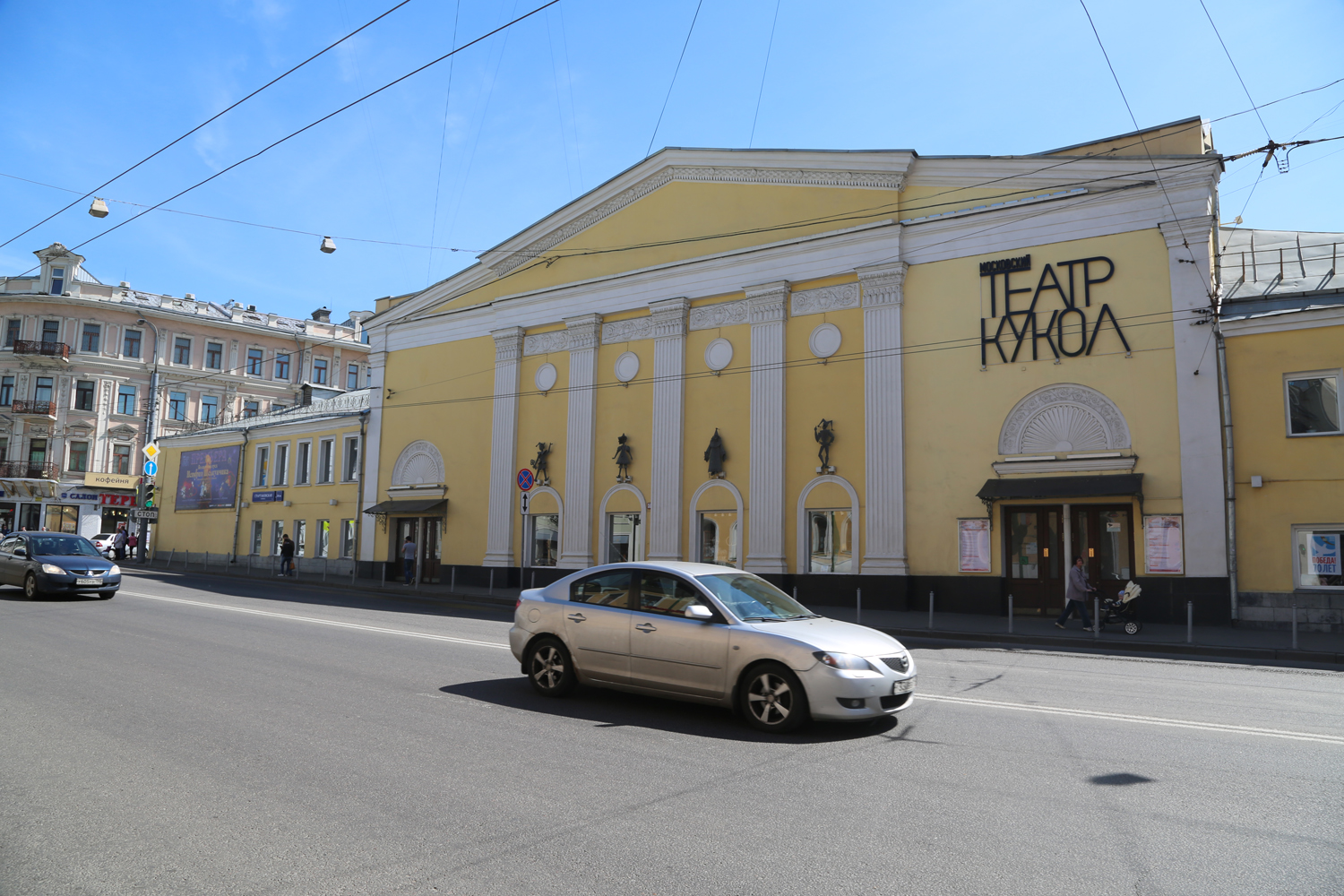 Московский театр кукол. Метро «Бауманская», Спартаковская улица, 26/30